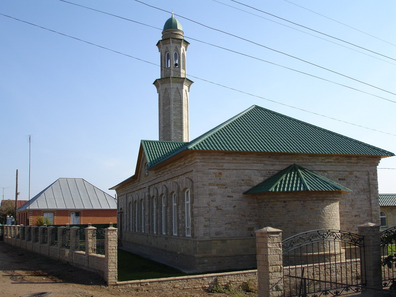 Отреставрированная Белая мечеть (тат. Ак мәчет) в с. Татарская Каргала, Оренбургская область, Россия